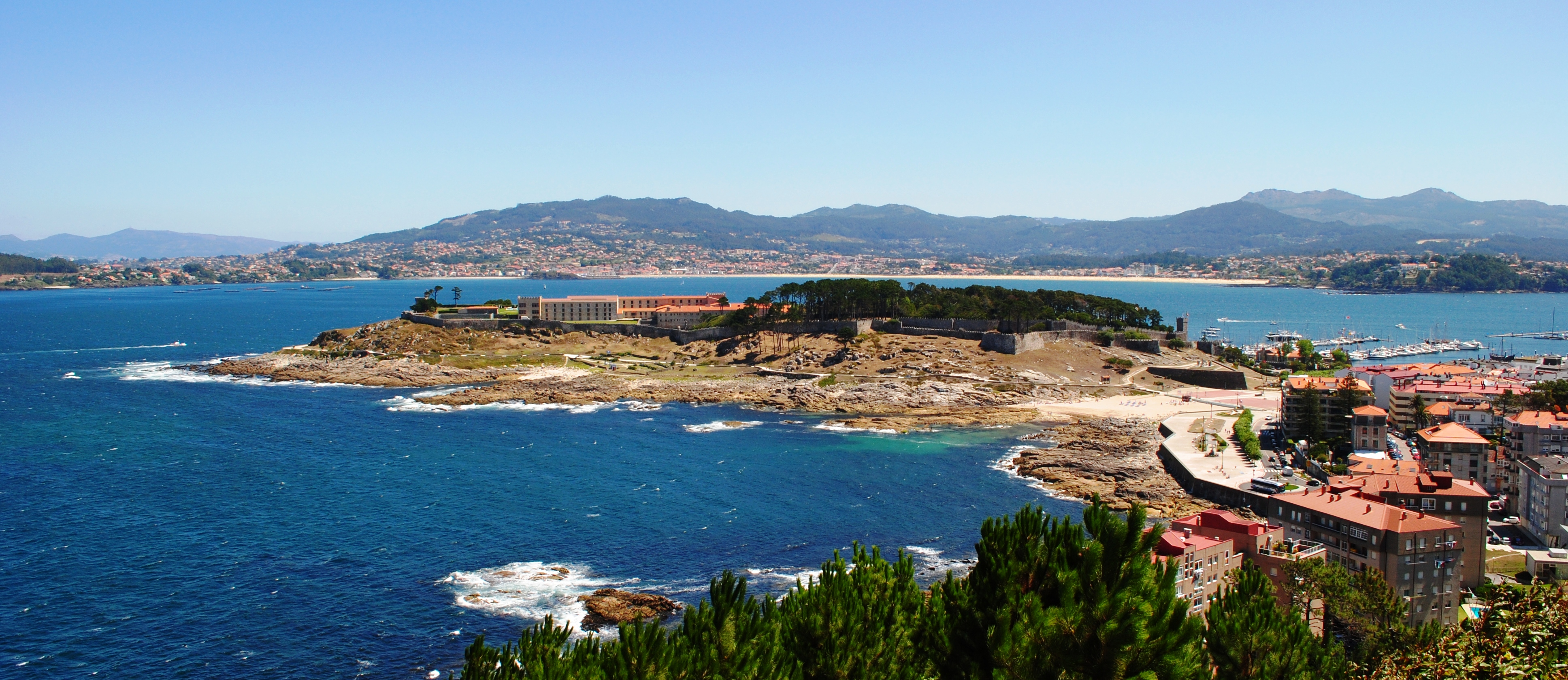 Baiona, Península de Monte Boi, panorámica.